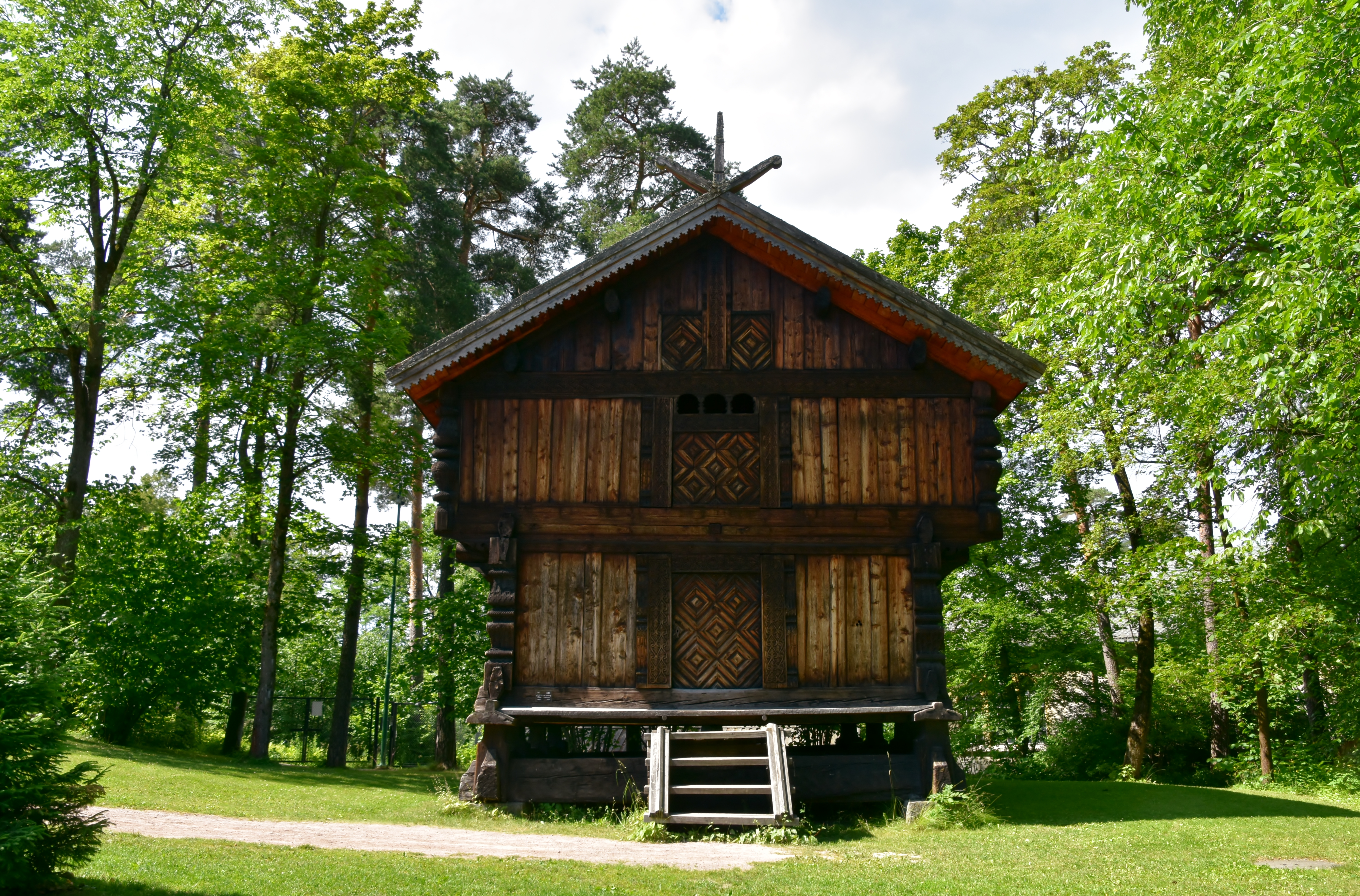 Loft storehouse, 1750-60, Norsk Folkemuseum, Oslo (2)